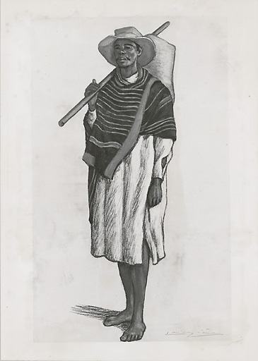 Homme Betsileo, Dessin au crayon de Lucien Lièvre, artiste français, né en 1878.